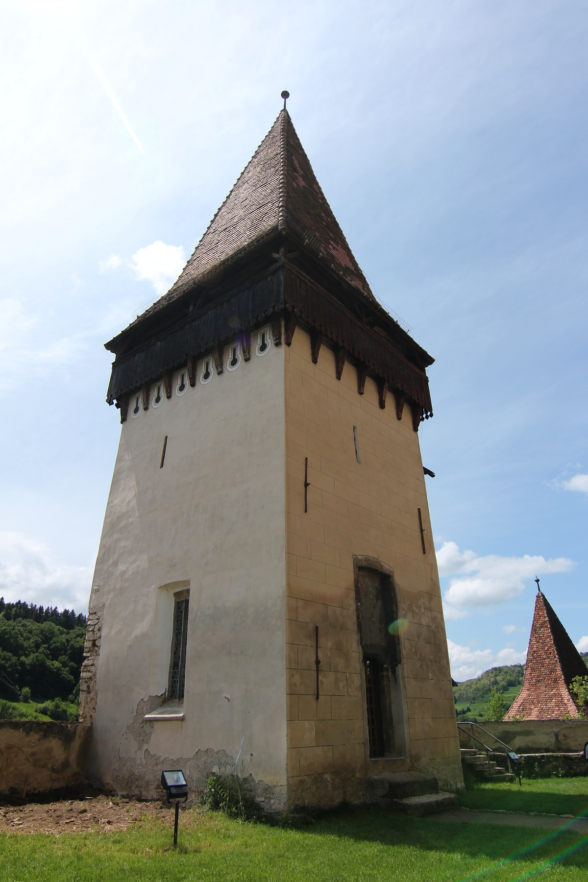 Biertan: Incintă fortificată interioară, cu trei turnuri, bastion, turn de poartă 02